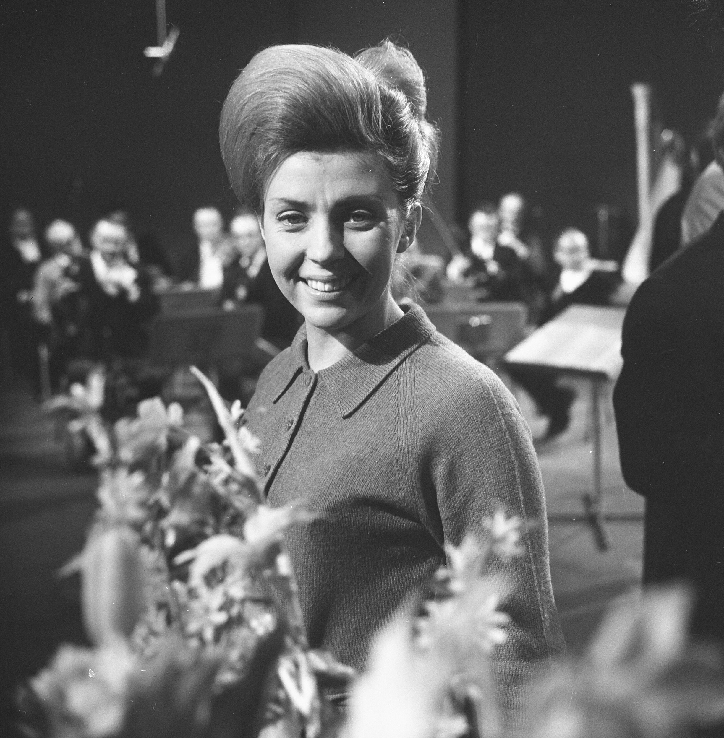 Collectie / Archief : Fotocollectie Anefo Reportage / Serie : [ onbekend ] Beschrijving : Nationaal Songfestival 1966, Helen Shepherd Datum : 5 februari 1966 Trefwoorden : artiesten, muziek, songfestivals, zangeressen Persoonsnaam : Shepherd, Helen Instellingsnaam : Nationaal Songfestival Fotograaf : Koch, Eric / Anefo Auteursrechthebbende : Nationaal Archief Materiaalsoort : Negatief (zwart/wit) Nummer archiefinventaris : bekijk toegang 2.24.01.03 Bestanddeelnummer : 918-7526